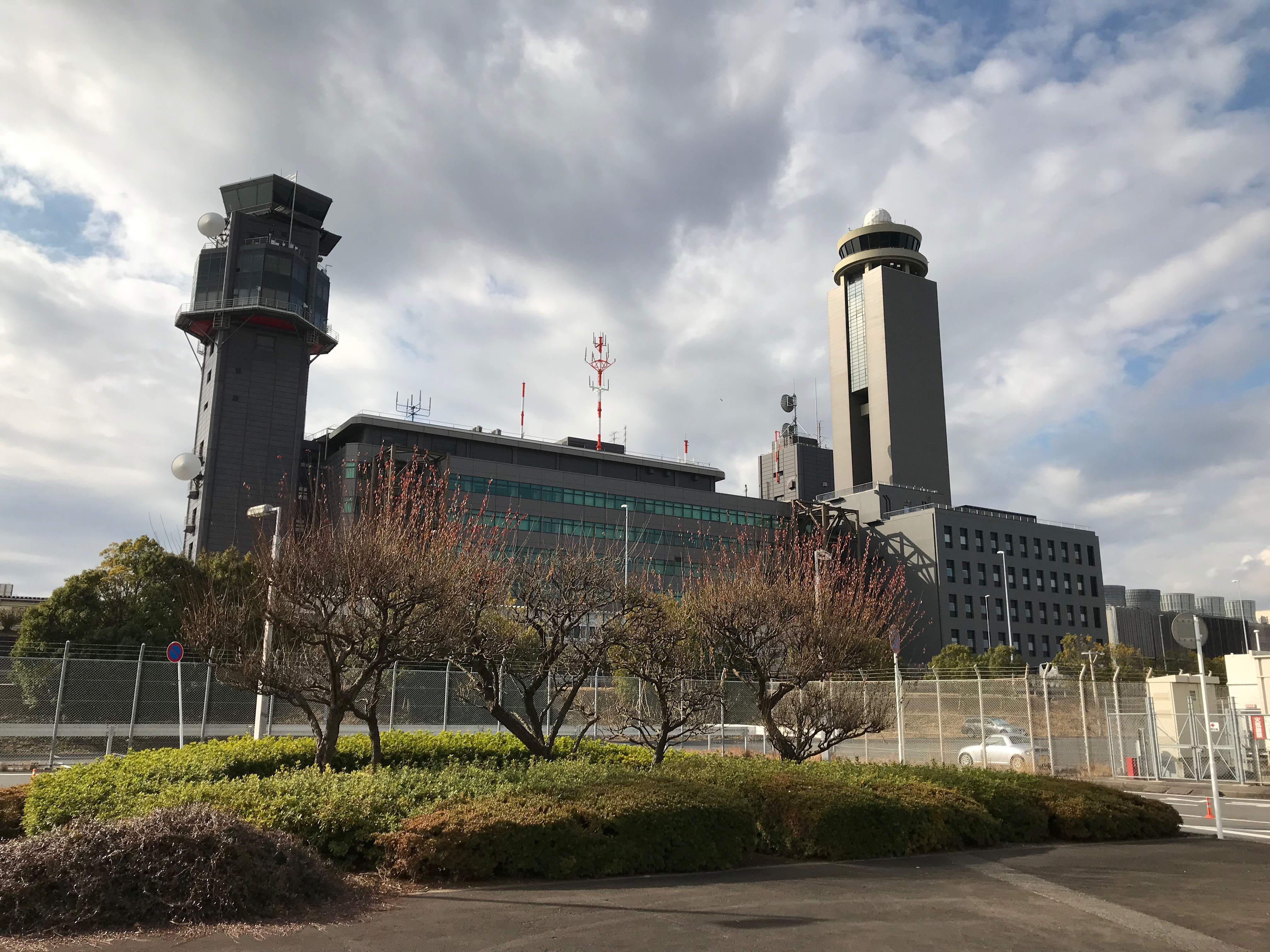 一坪共有地に植えられていた梅の木と空港管理ビル